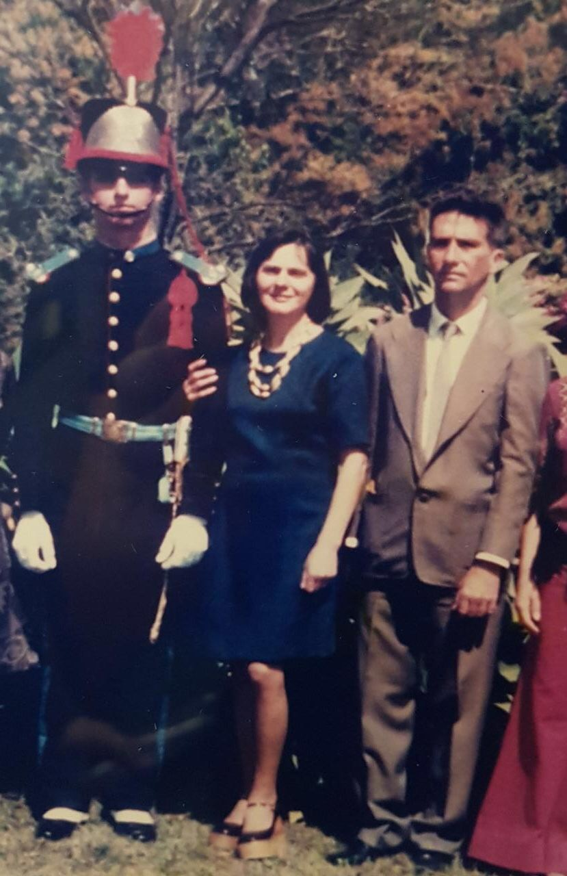 Jair Bolsonaro com seus pais.